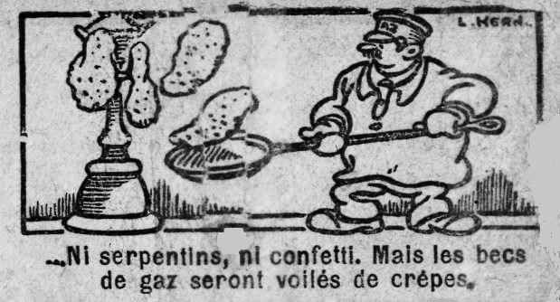 Dessin humoristique à propos de l'interdiction à Paris des confettis et serpentins, paru le mardi gras 17 février 1920 en première page, avec un autre dessin du même dessinateur à propos de l'absence du Bœuf Gras.